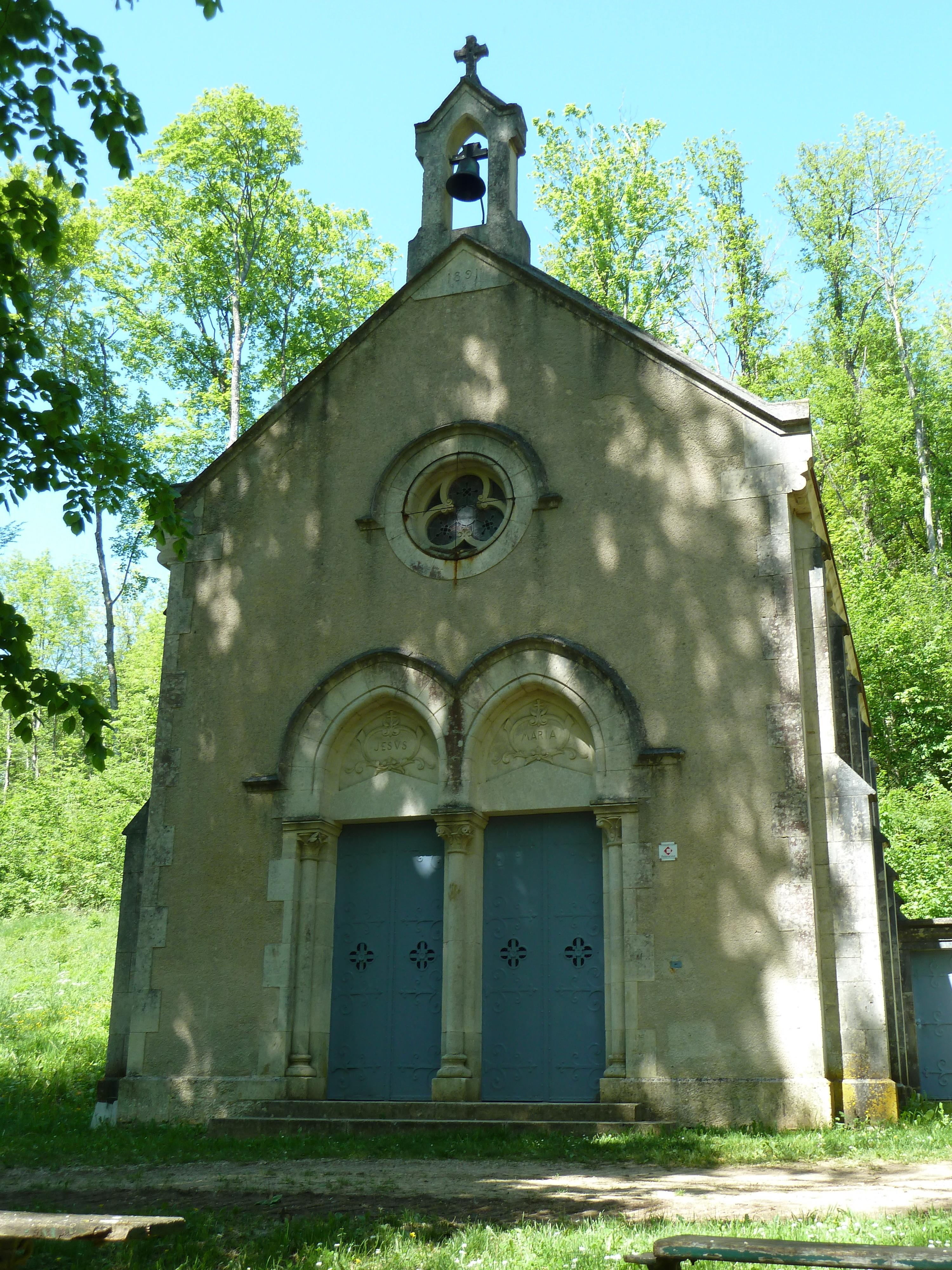 Jouy-sous-les-Côtes Chapelle de Jévaux 1891 - La façade avec son double portail, sa baie trilobée et son clocheton couronné d'une Croix celtique